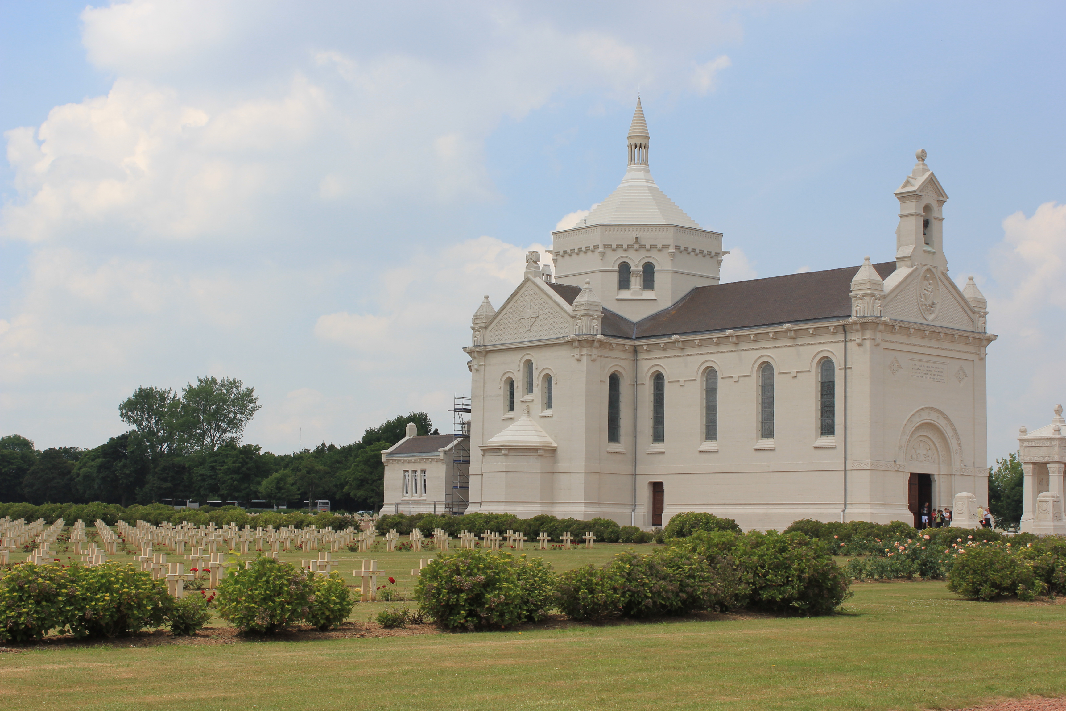 Notre Dame de Lorette (62) La chapelle